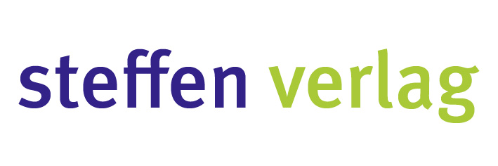 Logo des Steffen Verlags